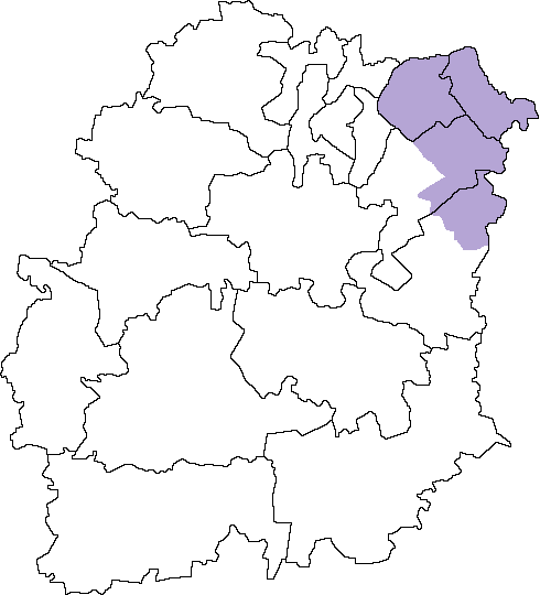 Carte de la première circonscription de l'Essonne (91) de 1968 à 1986